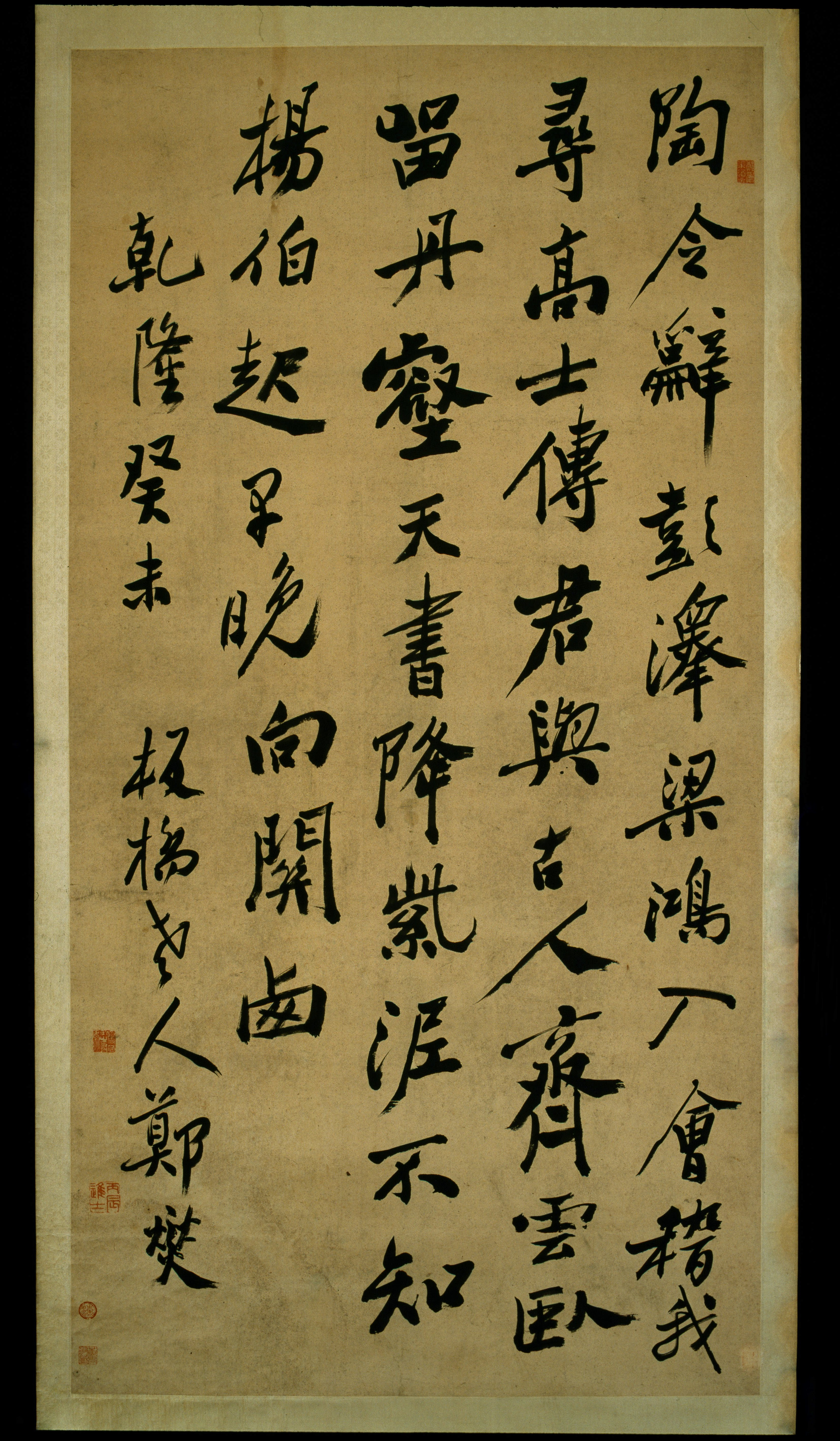 釋文：陶令辭彭澤，梁鴻入會稽。我尋高士傳，君與古人齊。雲臥留丹壑，天書降紫泥。不知楊伯起，早晚向關西。 款署：乾隆癸未。板橋老人鄭燮。 鈐印：燮何力之有焉（白文）、丙辰進士（朱文）